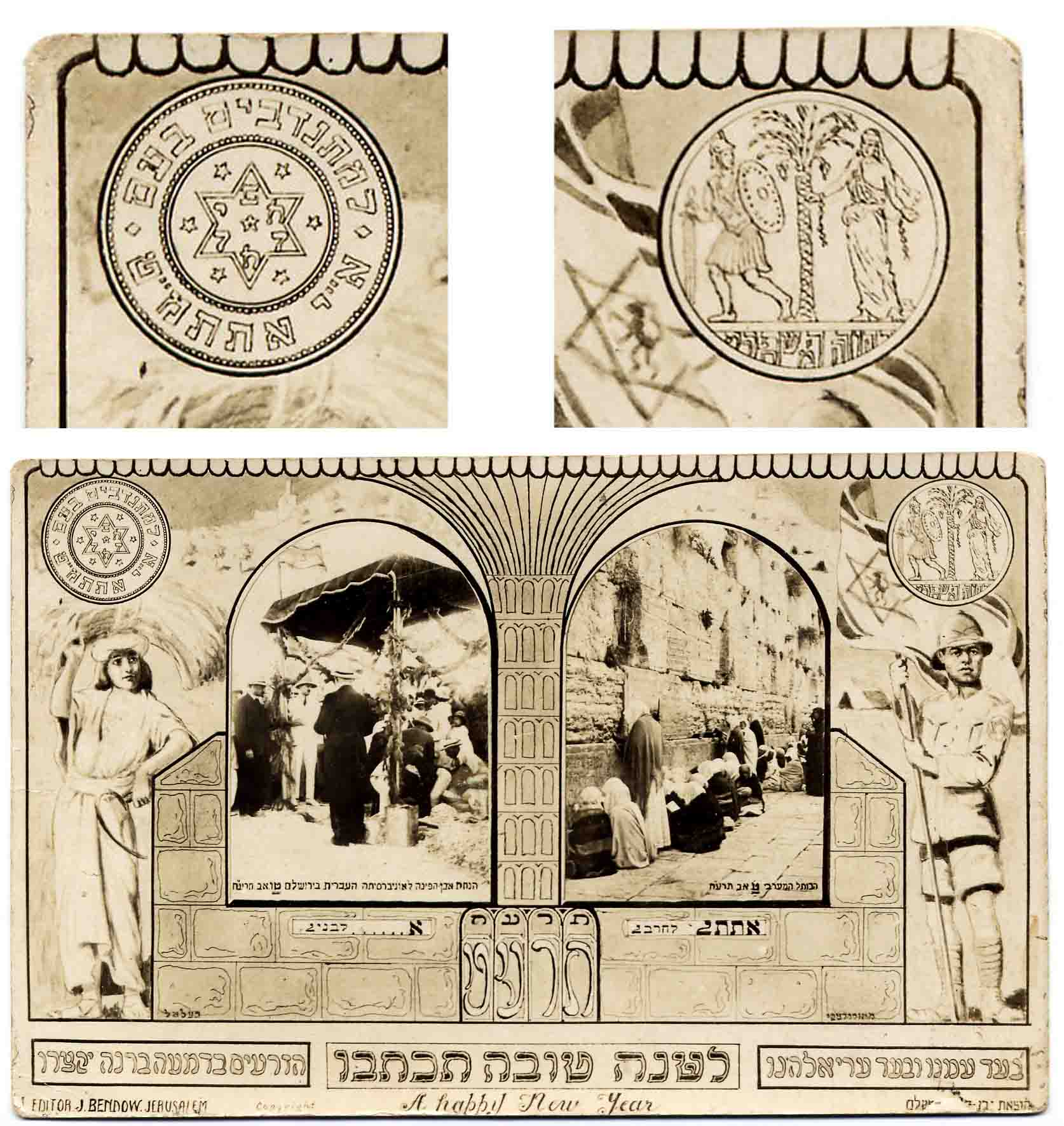 גלוית דואר / כרטיס ברכה עם עם עיטורי יהודה המשתחררת